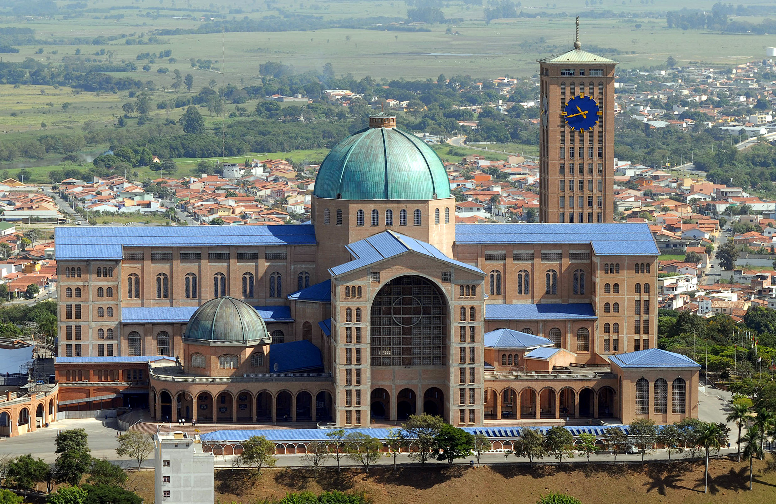 Santuário Nacional de Aparecida, localizado em Aparecida, SP - Brasil.National Sanctuary of Aparecida, located in Aparecida, SP - Brazil.